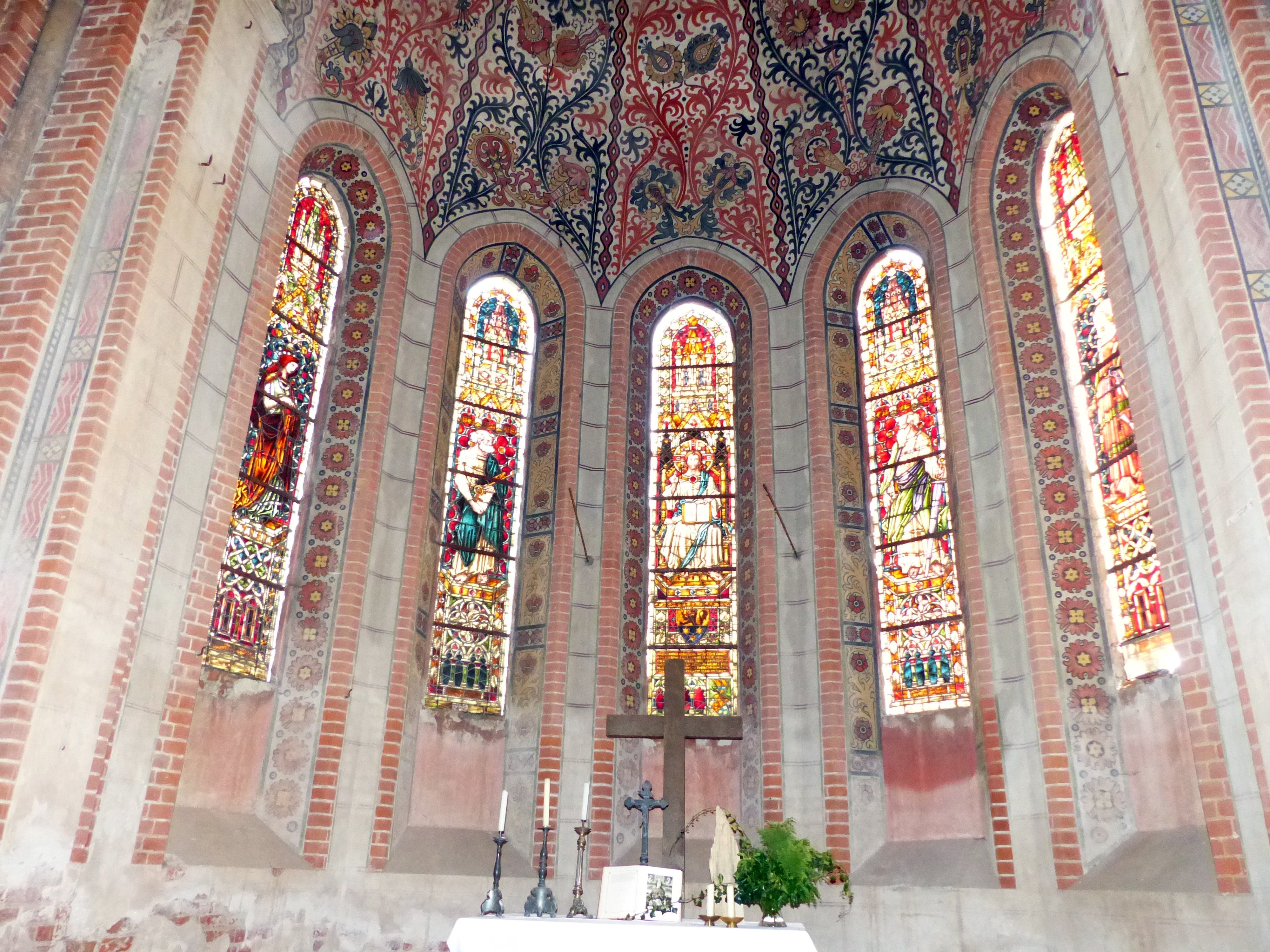 Klosterkirche St. Maria (Mühlberg an der Elbe), Brandenburg